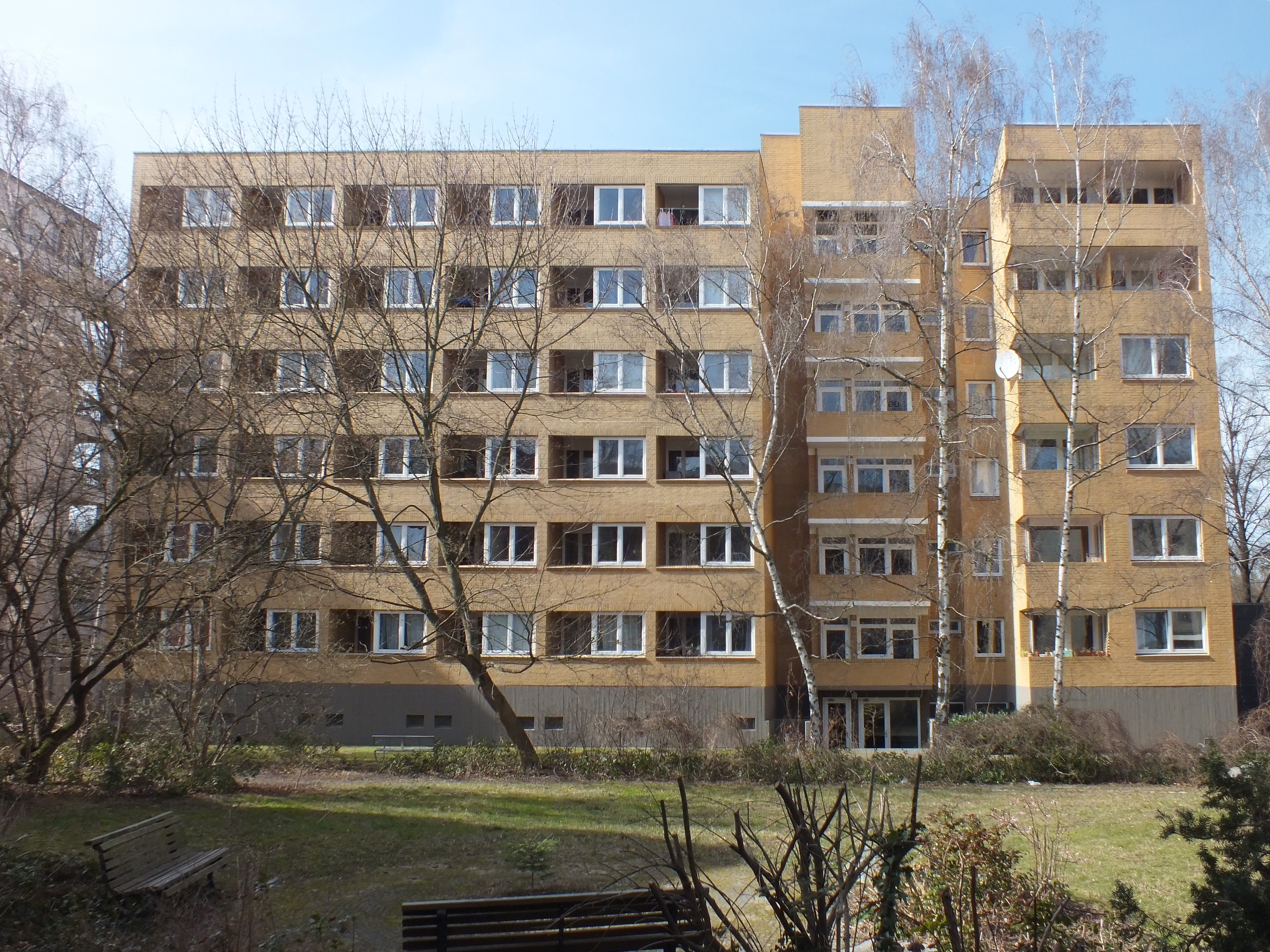 Fontanepromenade 13a in Kreuzberg: Ansicht von der Hofseite